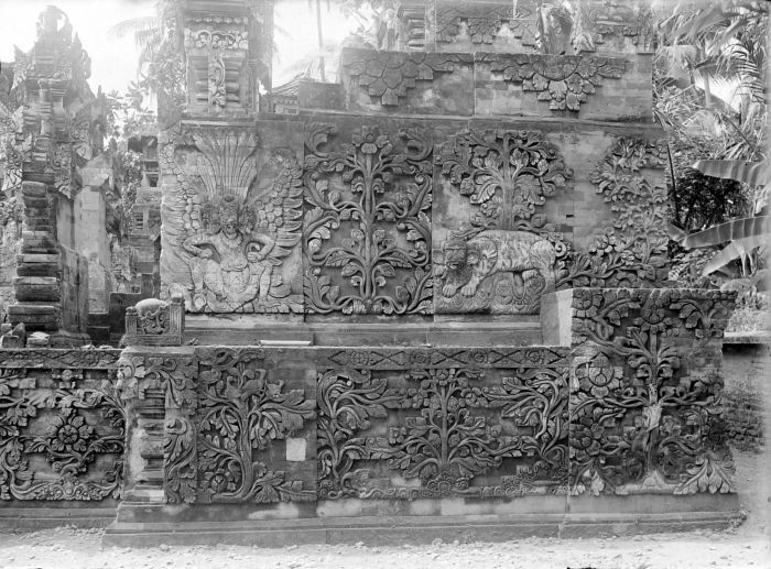 Negatief. Reliëfs op een muur in de Pura Beji te Sangsit